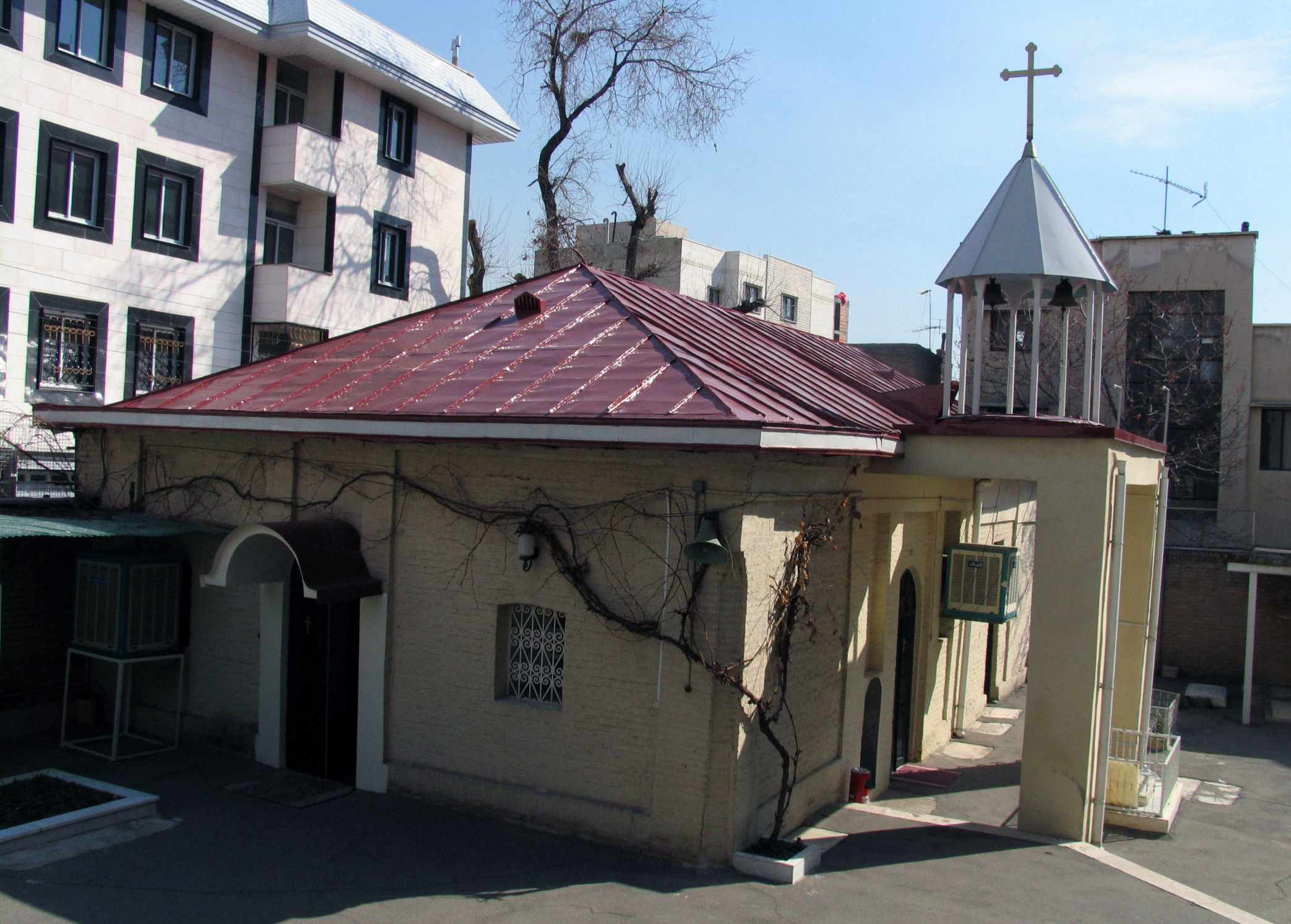 հայկական եկեղեցի Թեհրանում